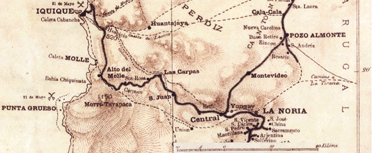 Schienennetz zwischen Iquique und den Salpeterwerken von La Noria. Situation um 1879. Auszug aus einer Karte von A. Bertrand.